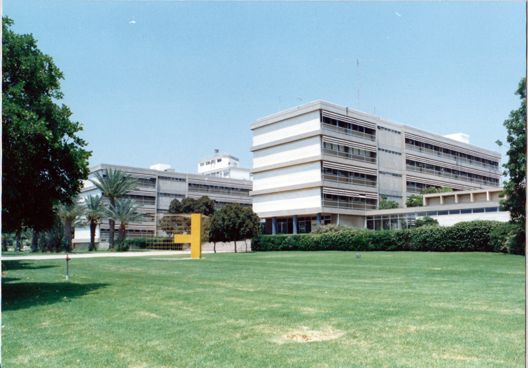 בניין מדעי הטבע באוניברסיטת תל אביב